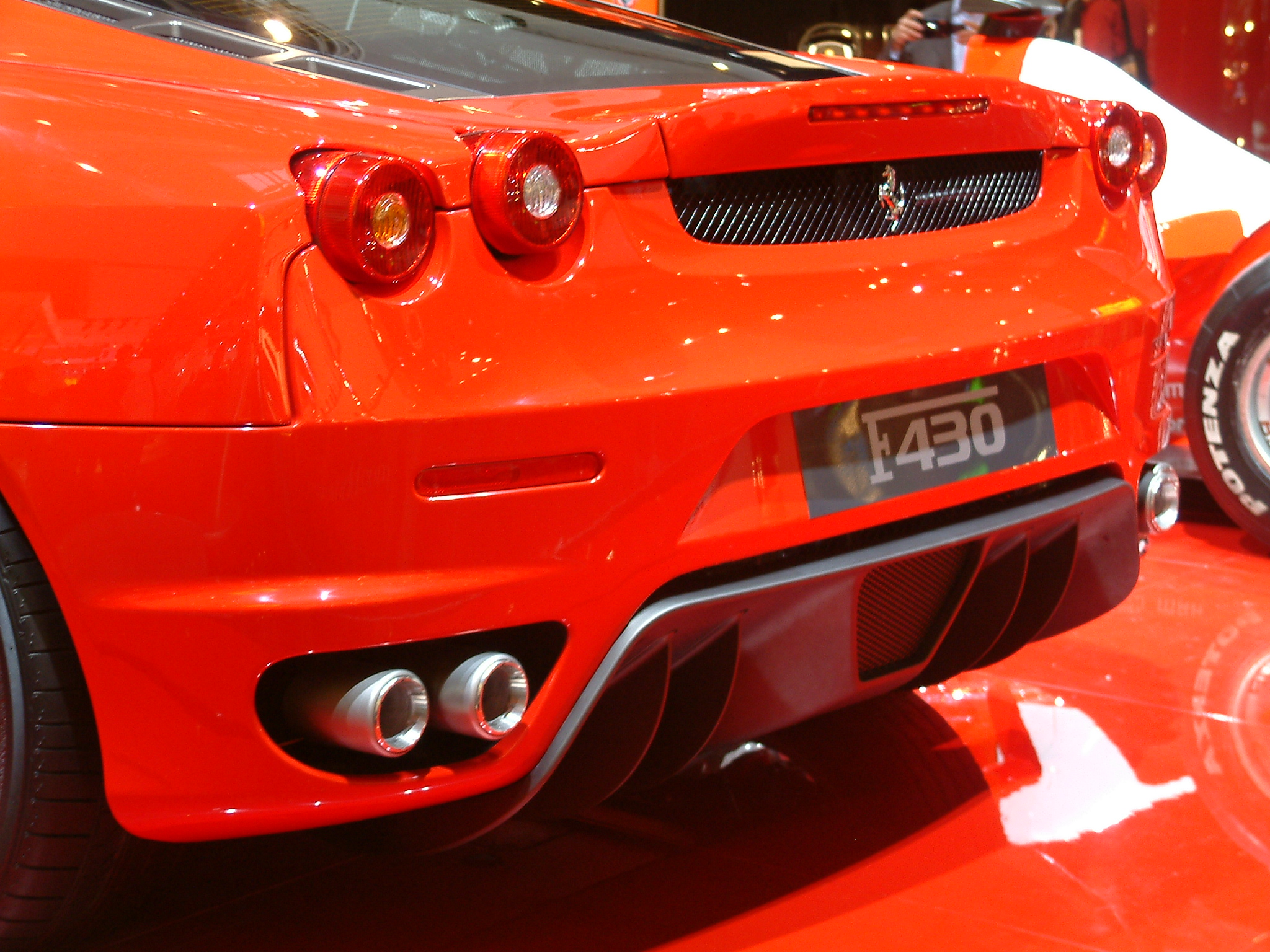 Ferrari F430